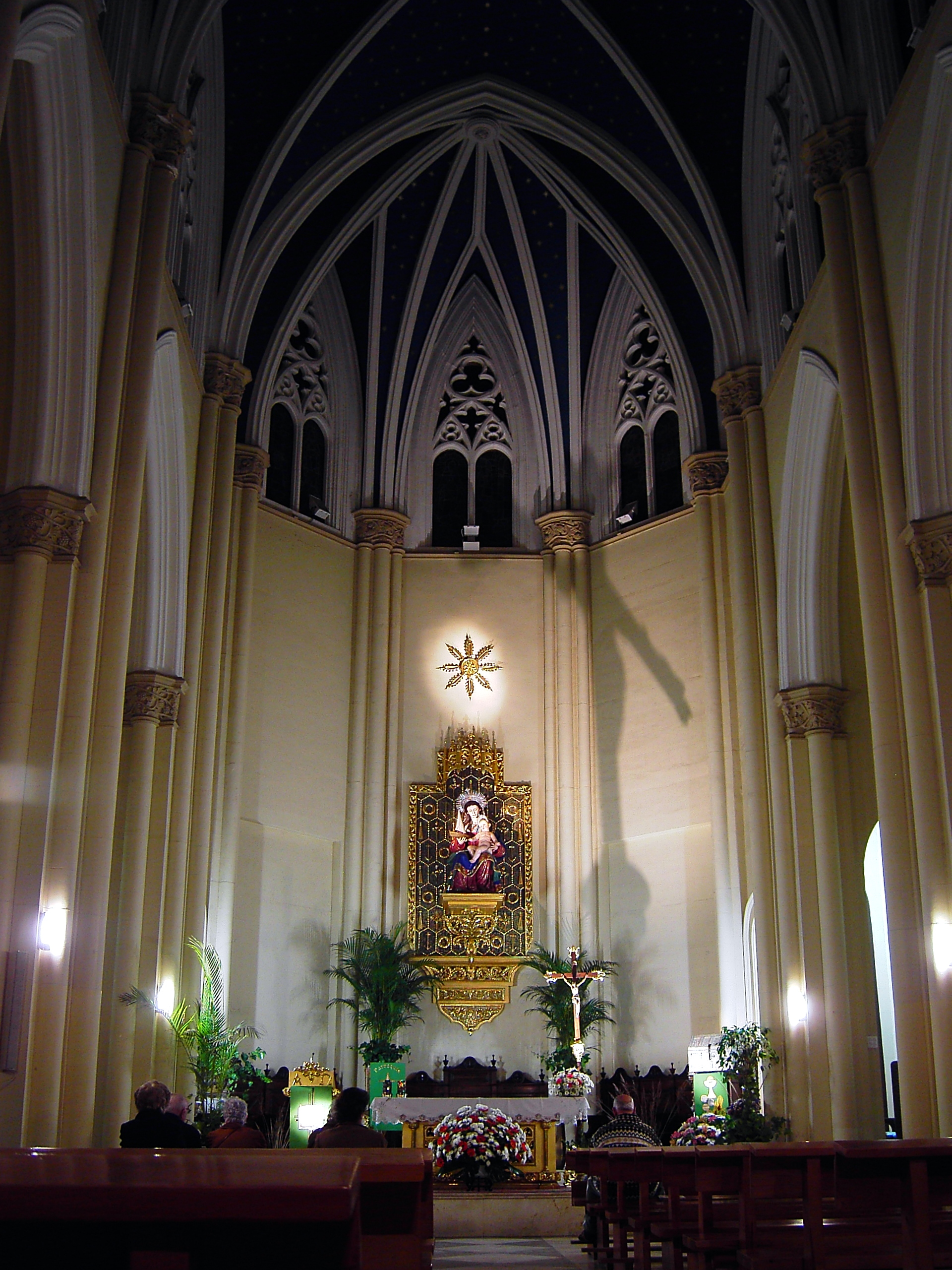 Iglesia de la Milagrosa, interior (Huelva, España)